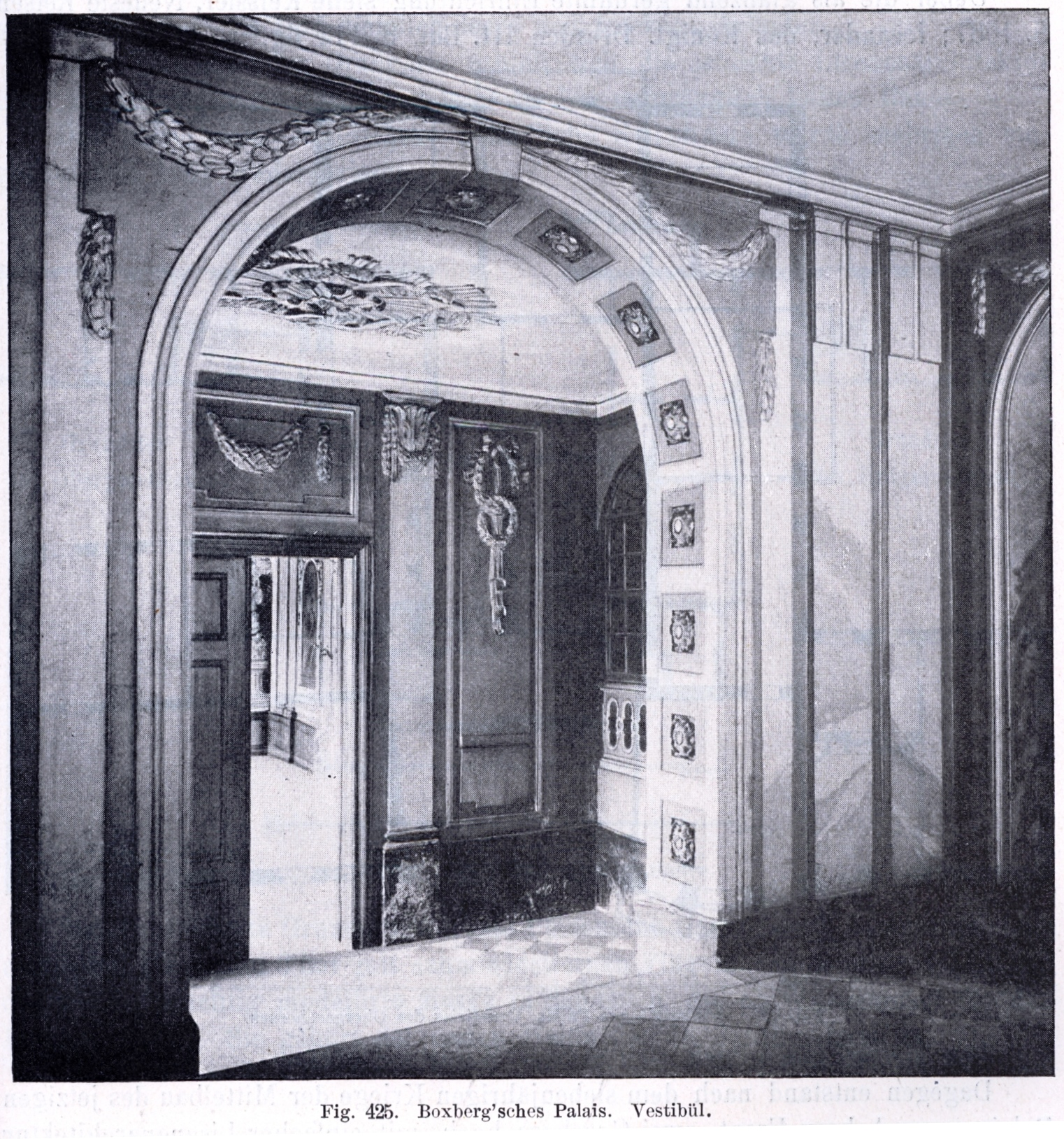 Dresden, Palais Boxberg, Vestibül